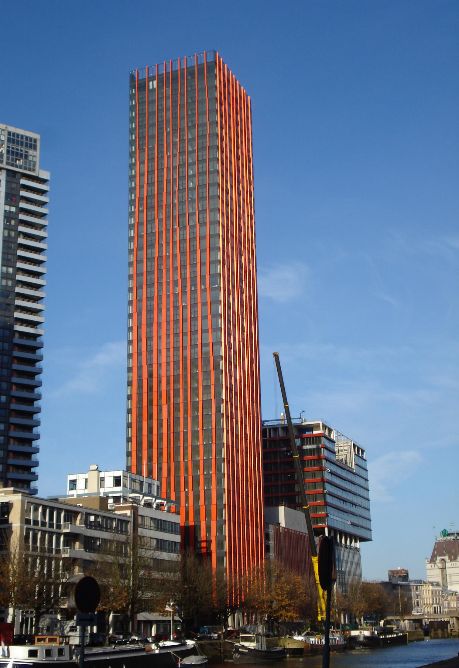 Rotterdam centrum. Woontoren in aanbouw "Red Apple" (november 2008).